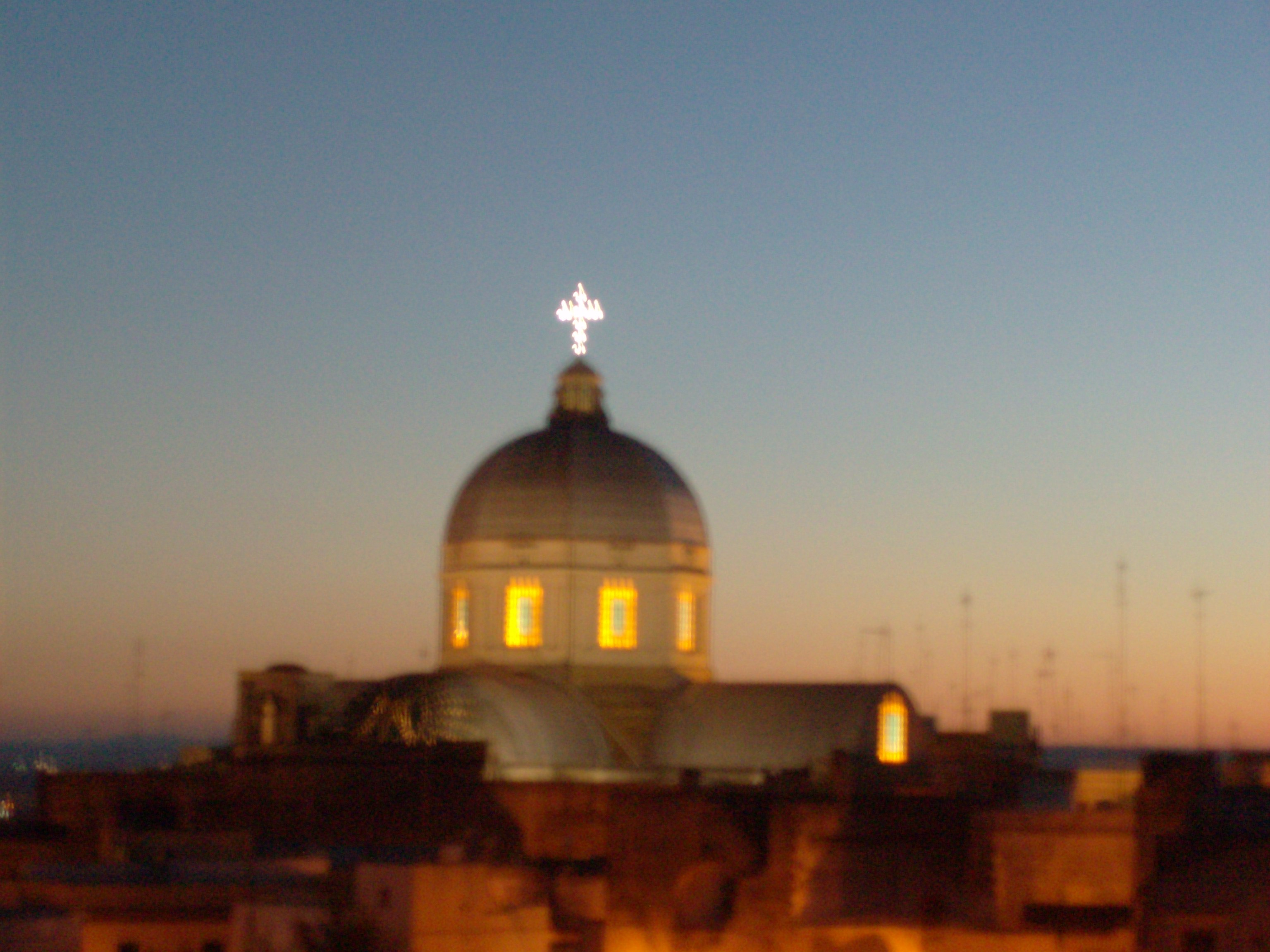 Massafra di notte